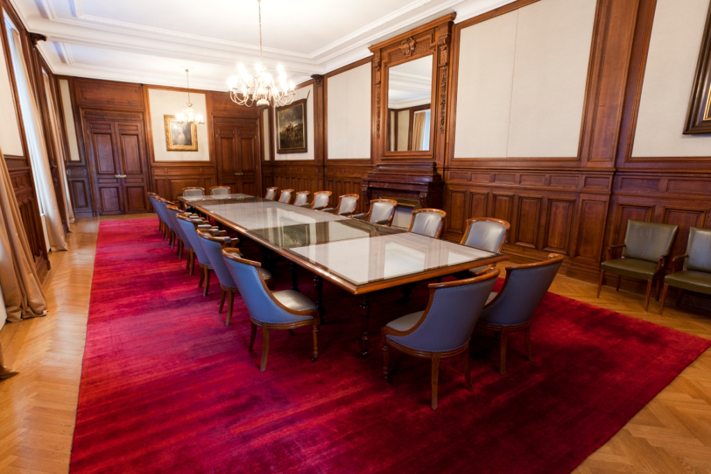 Rothschildsaal der Schoellerbank